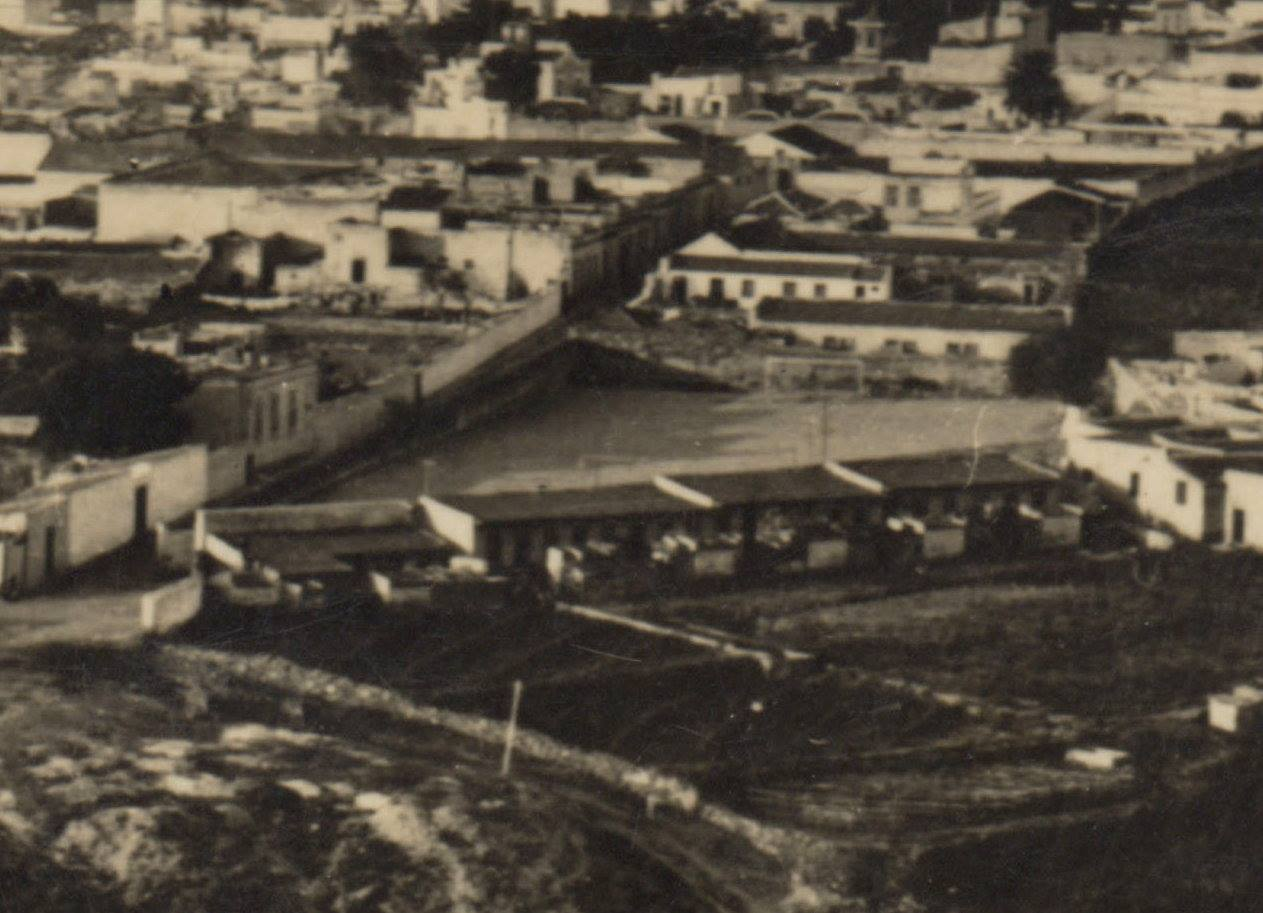 Campo de la calle San Miguel (Santa Cruz de Tenerife), propiedad del Club Deportivo Iberia